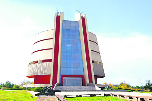 Панорама Плевенска епопея 1877